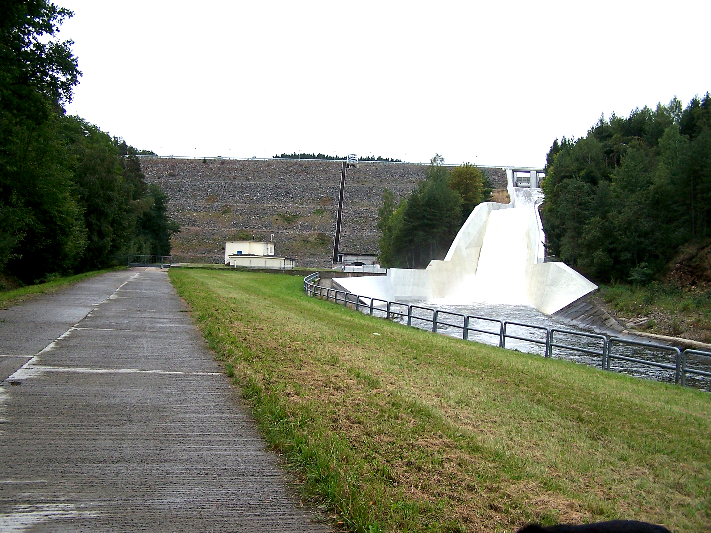 Česky: Římovská vodní nádrž vypouštějící vodu přepadem